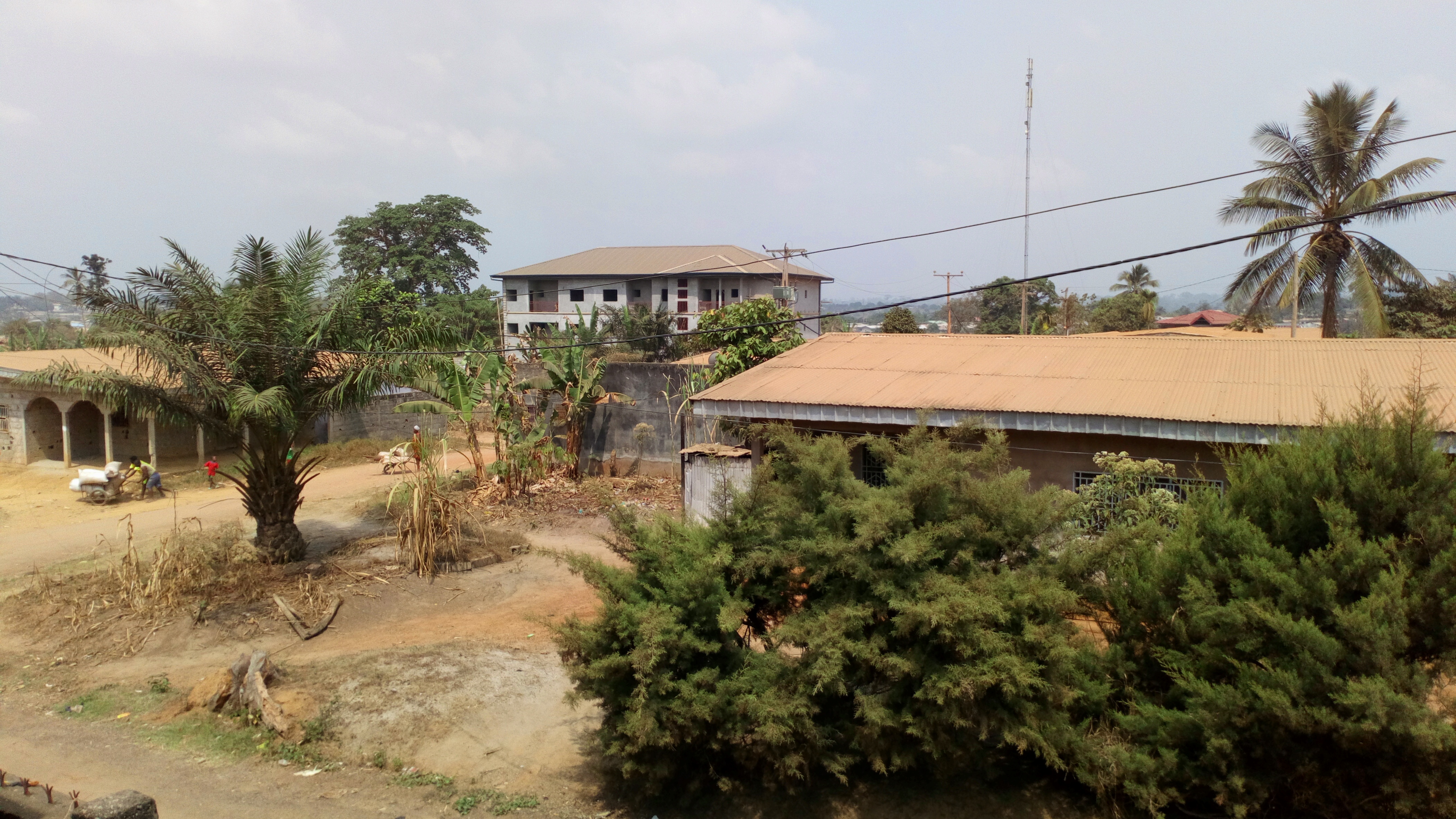 Filmé au carrefour MBASSI en février 2020